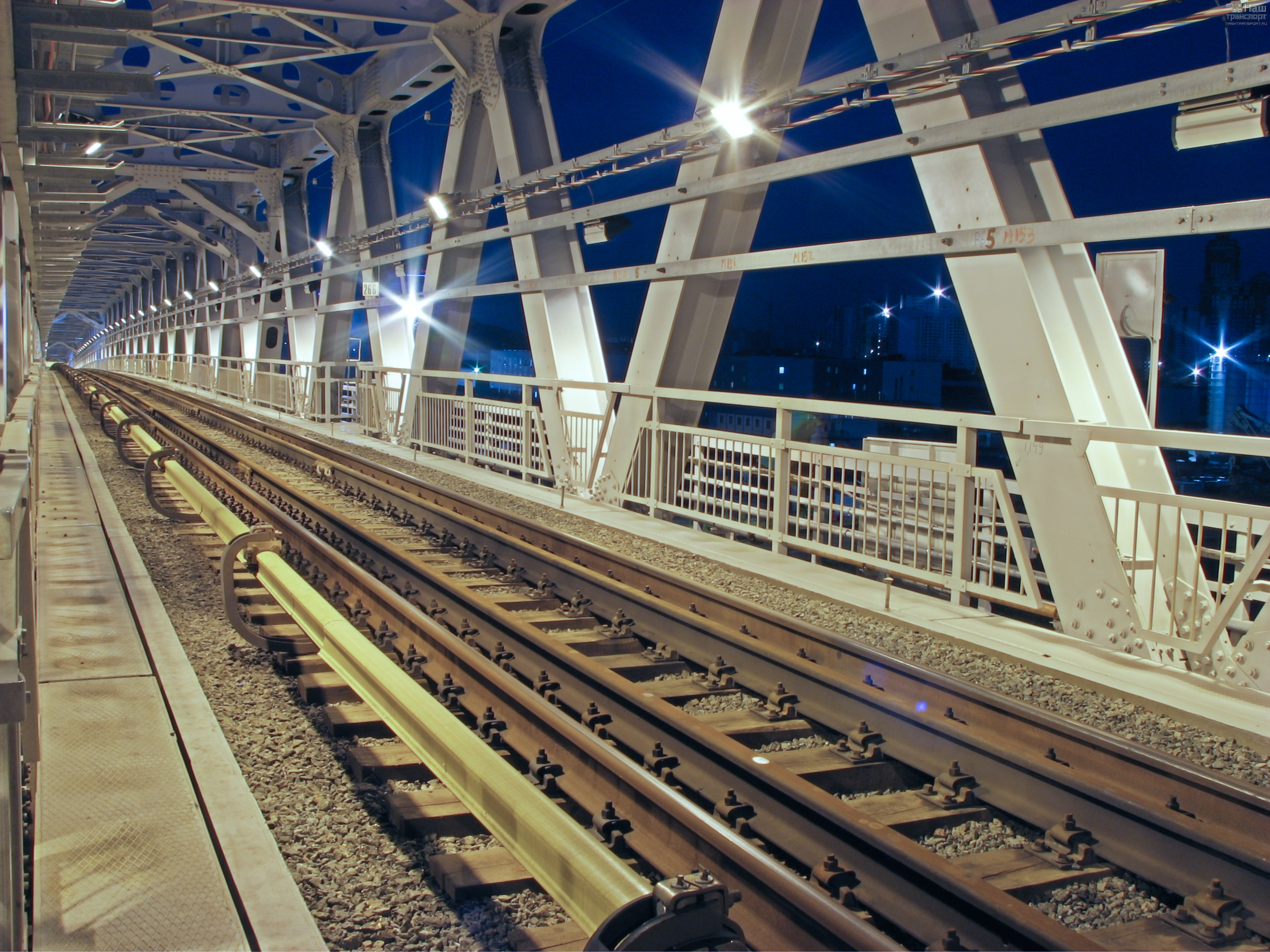 Митинский (Мякининский) метромост. Вид изнутри